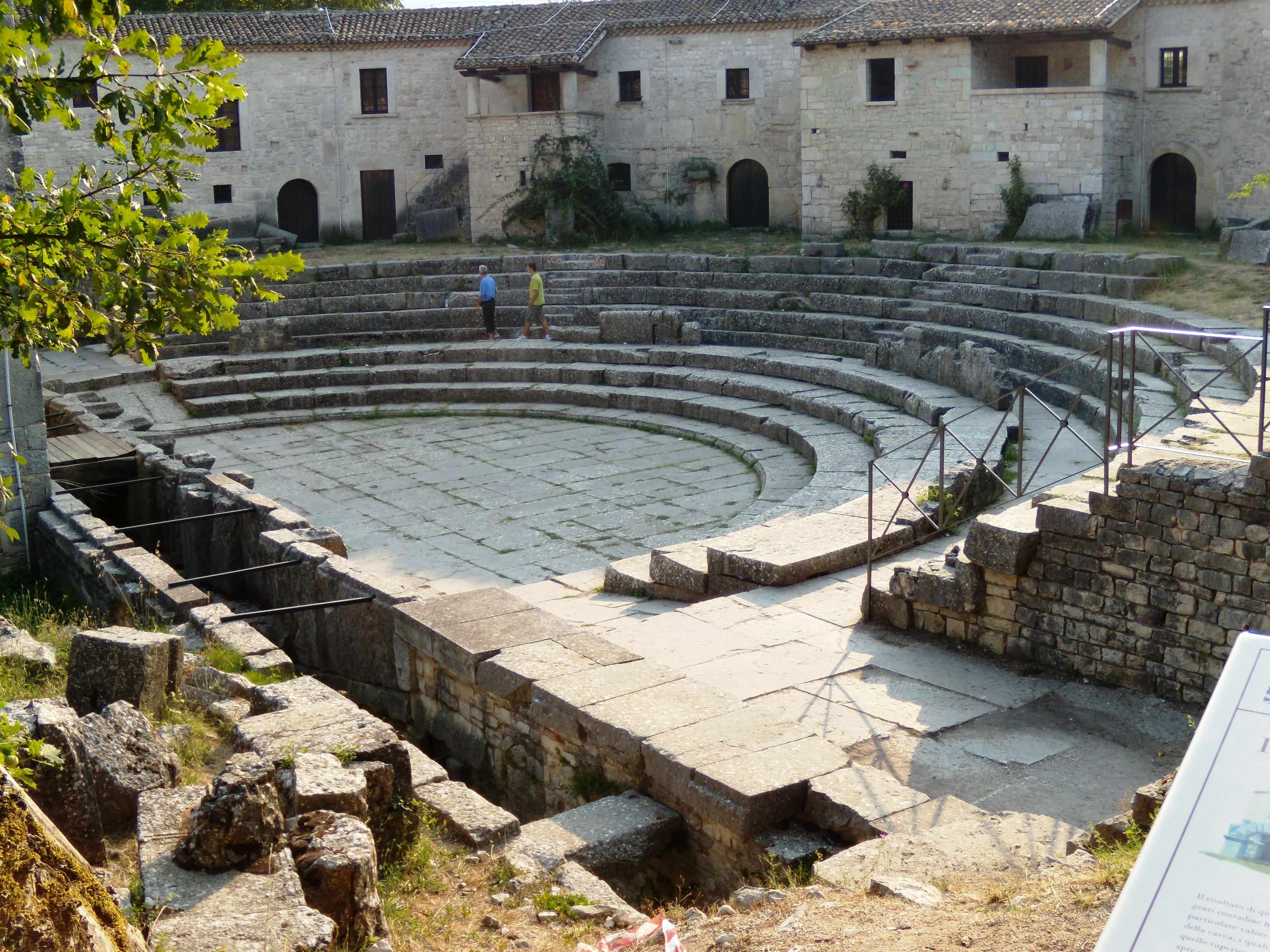 Scavi archeologici di Saepinum (Italy): il teatro di epoca romana.